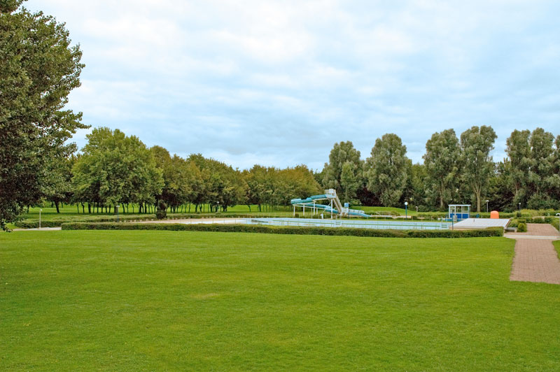 Germany Bergkamen Wellenbad